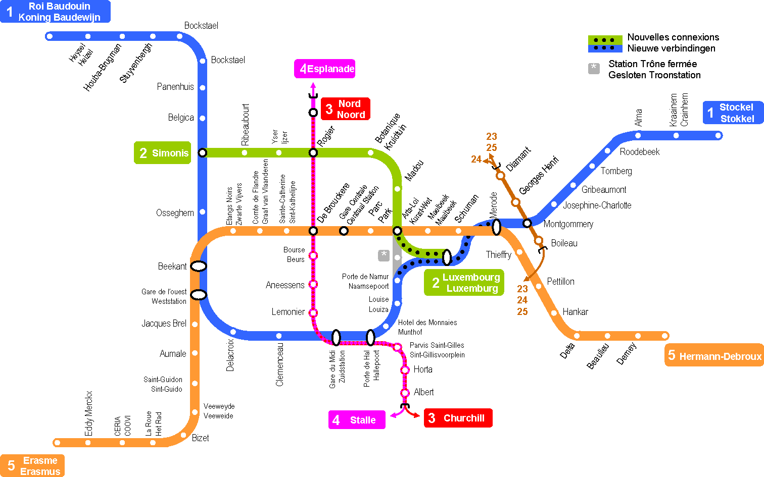 Vision du métro de Bruxelles